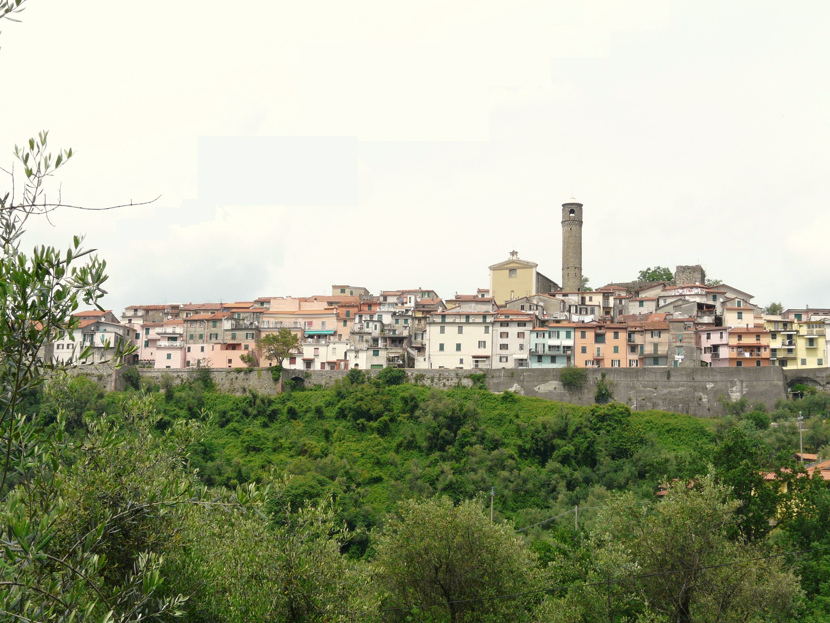 Panorama di Caprigliola, Comune di Aulla, Toscana, Italia